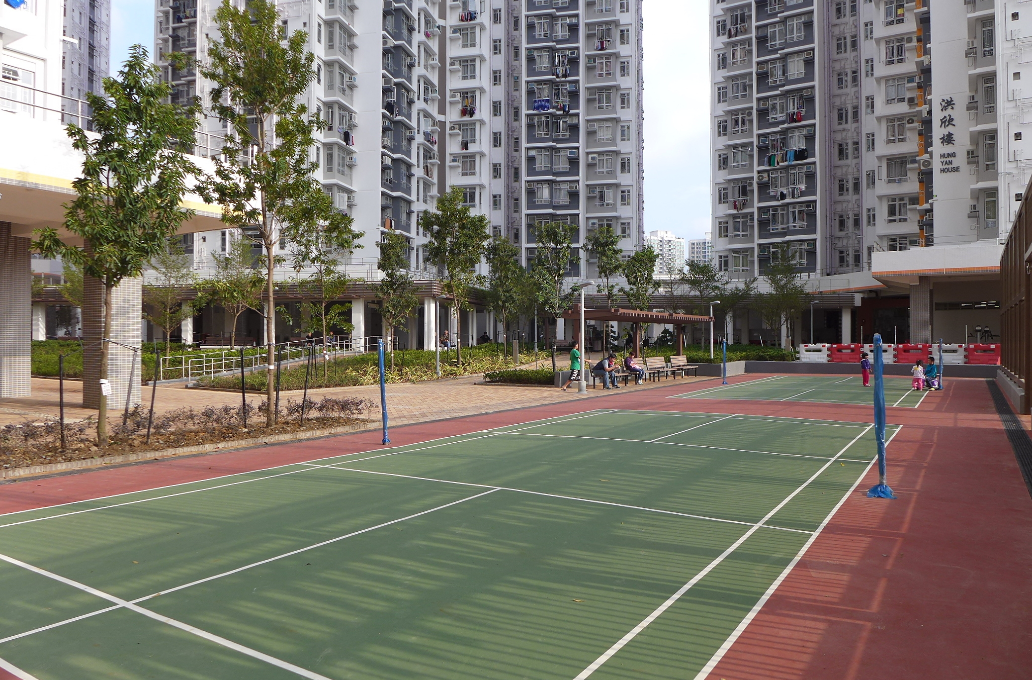 Hung Fuk Estate Badminton Court